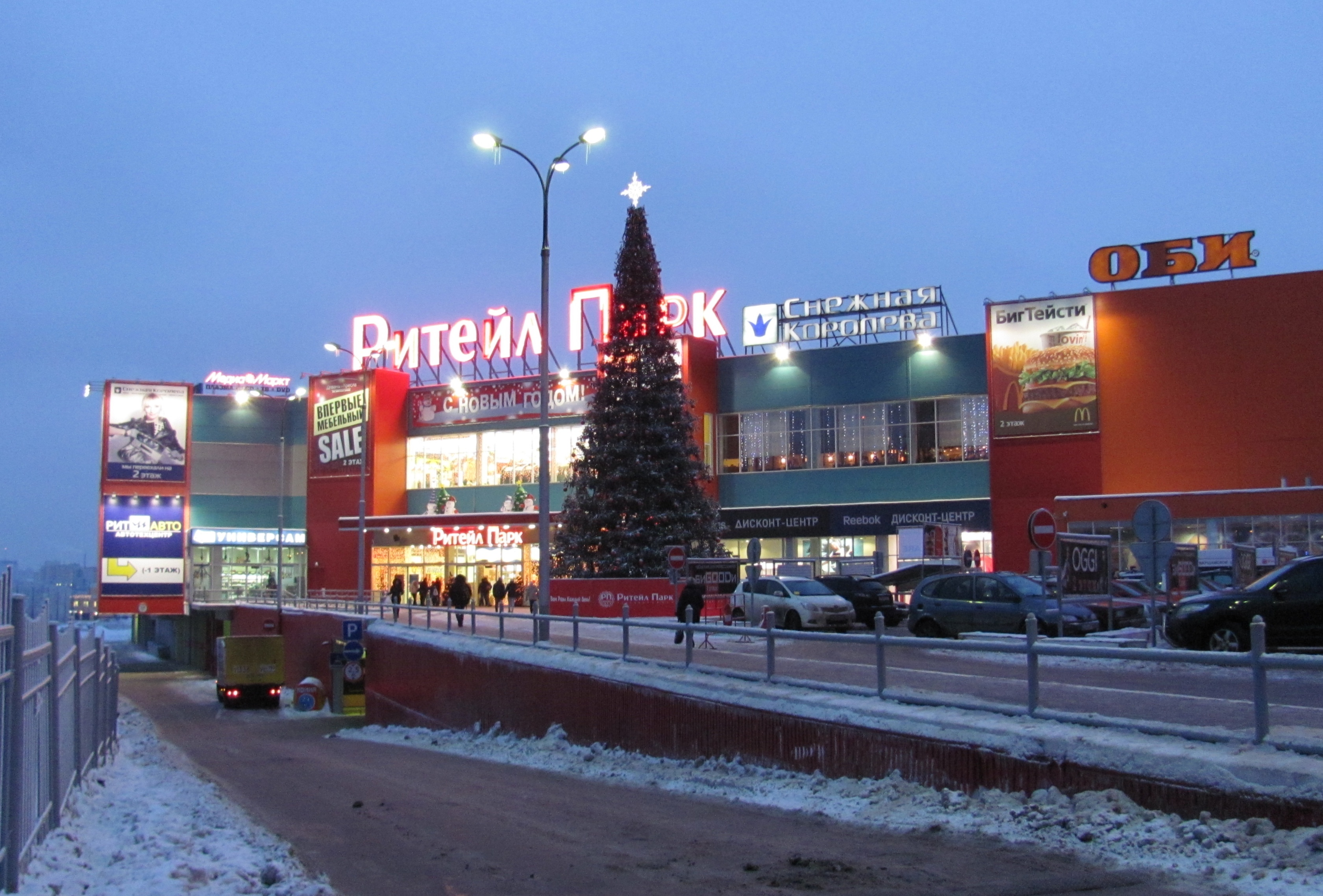 Торговый центр «Ритейл Парк» в Москве.